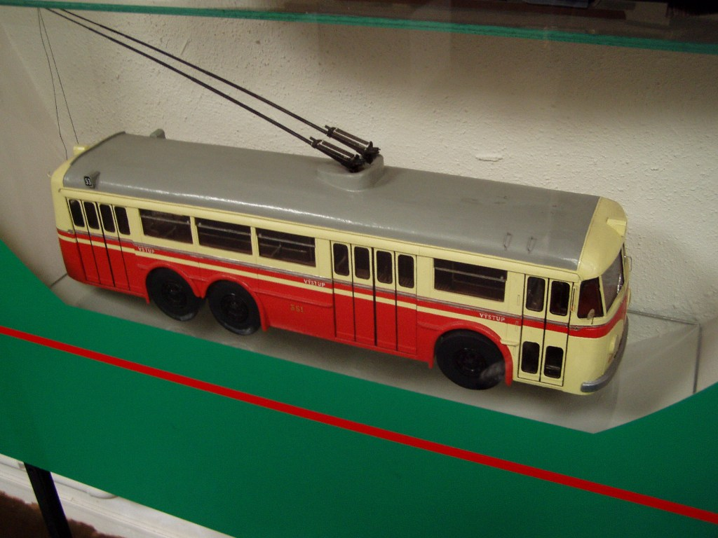 Model trolejbusu Tatra T400